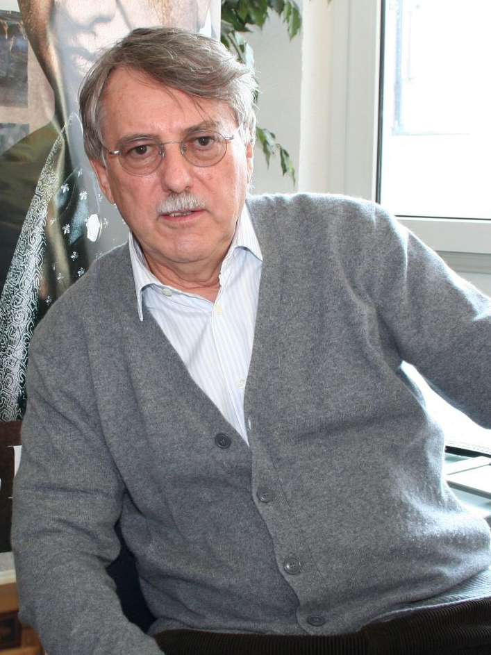 Regisseur Heinrich Breloer bei der Vorstellung seiner Literaturverfilmung Buddenbrooks im Mannheimer Cineplex